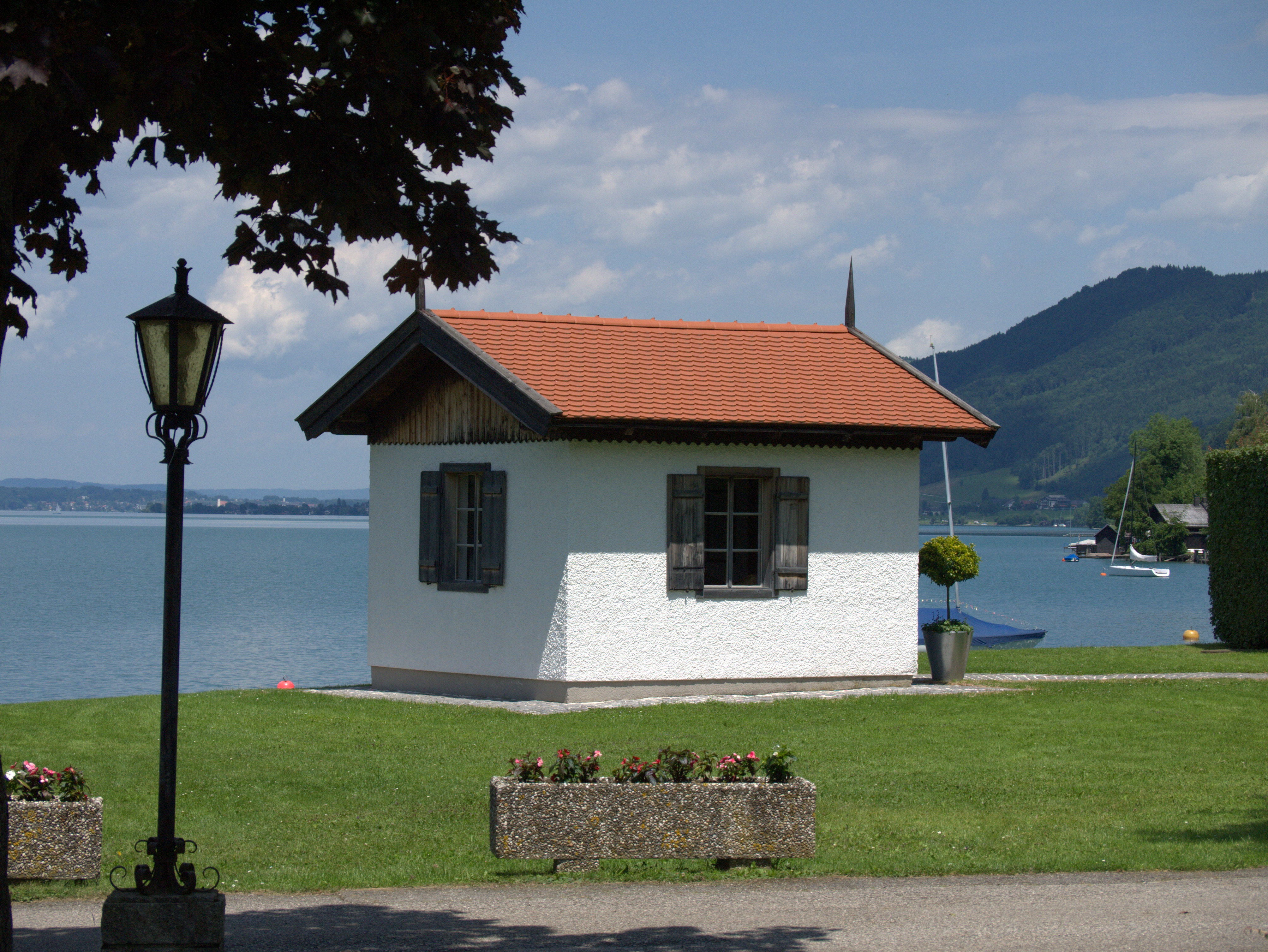 Gustav Mahler-Komponierhäuschen